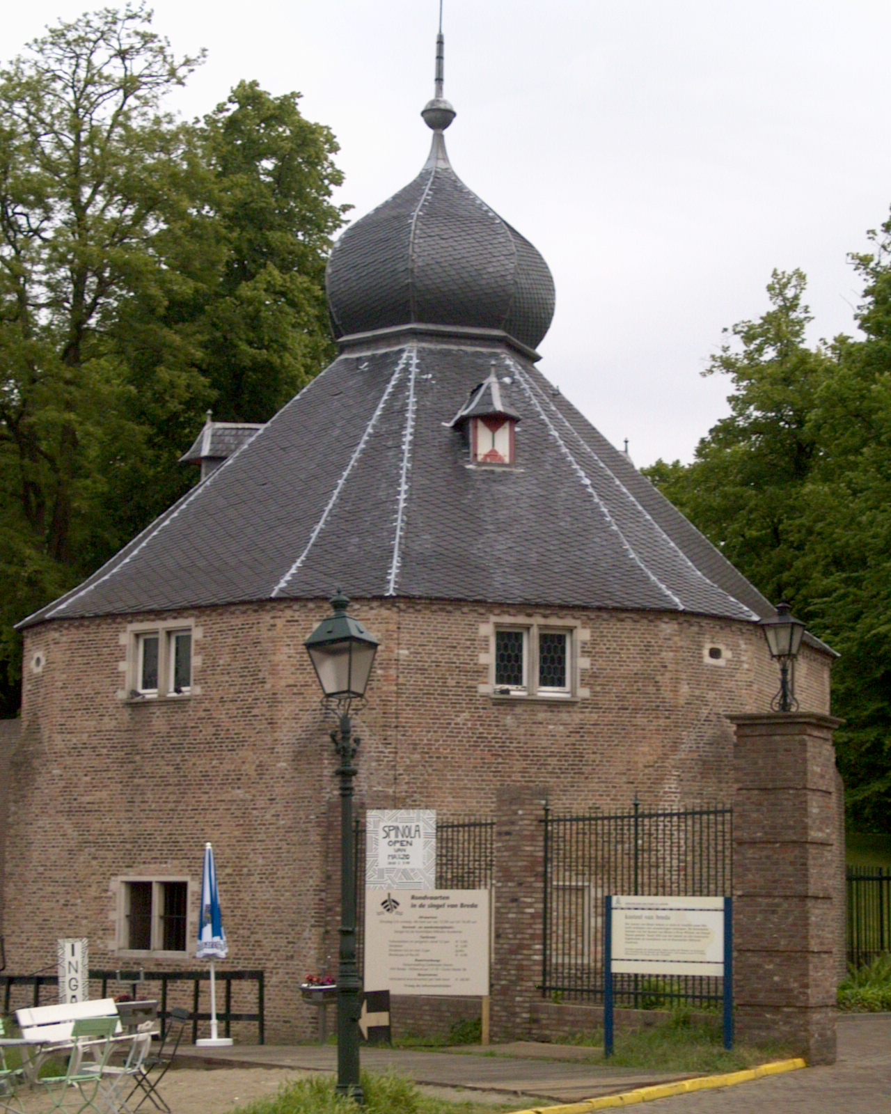 Zicht op deel van de Duiventoren van het Kasteel van Breda gelegen in Breda Centrum in Breda. Nabij de haven van Breda